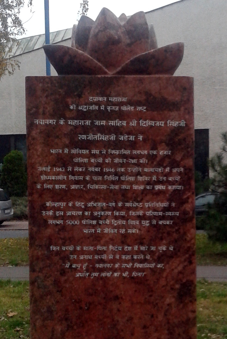 Pomnik Dobrego Maharadży Digvijaysinhji Ranjitsinhji w Warszawie na skwerze jego imienia – róg Opaczewskiej i Białobrzeskiej